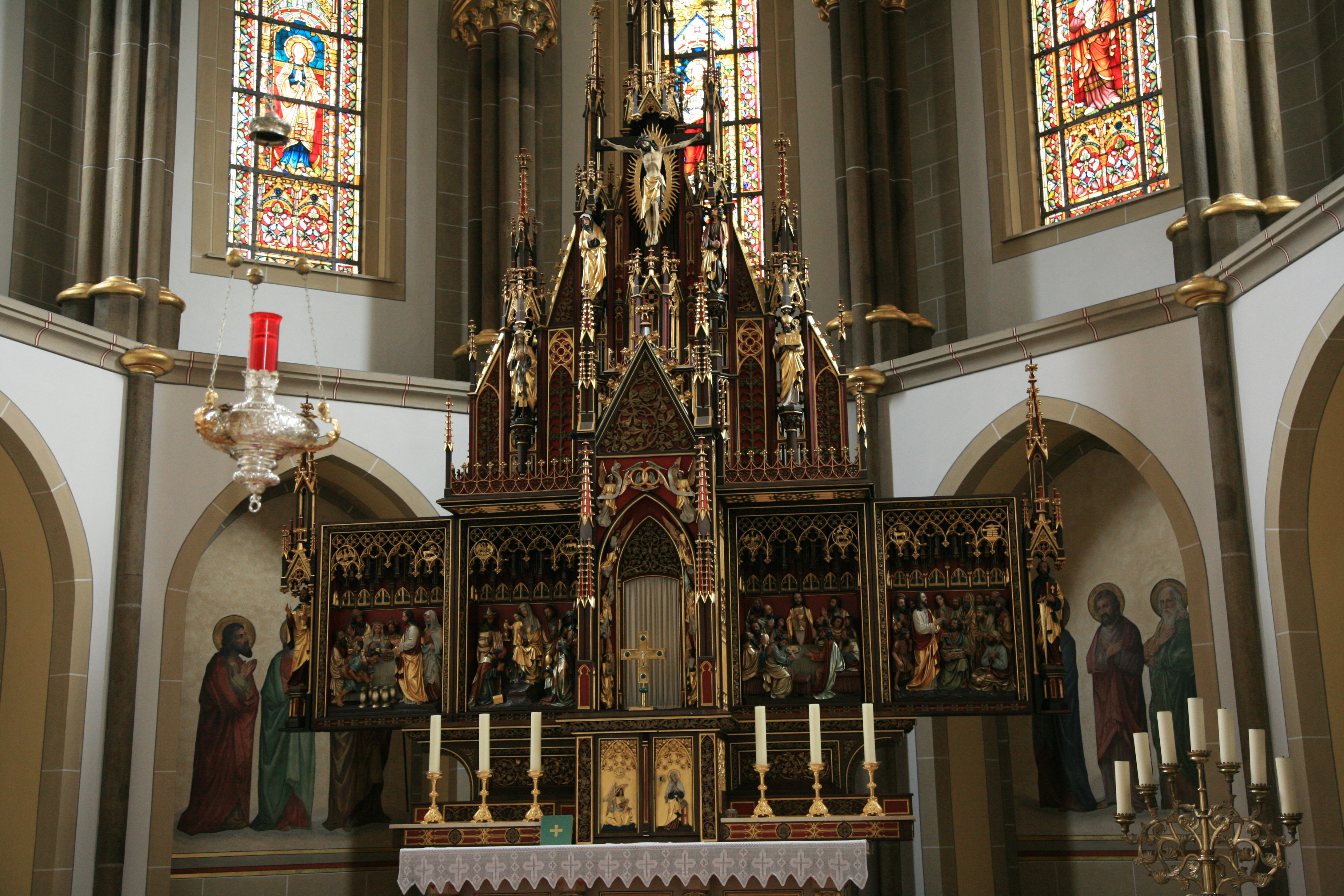 St. Gertrud Kirche is a church in Lohne (Oldenburg)